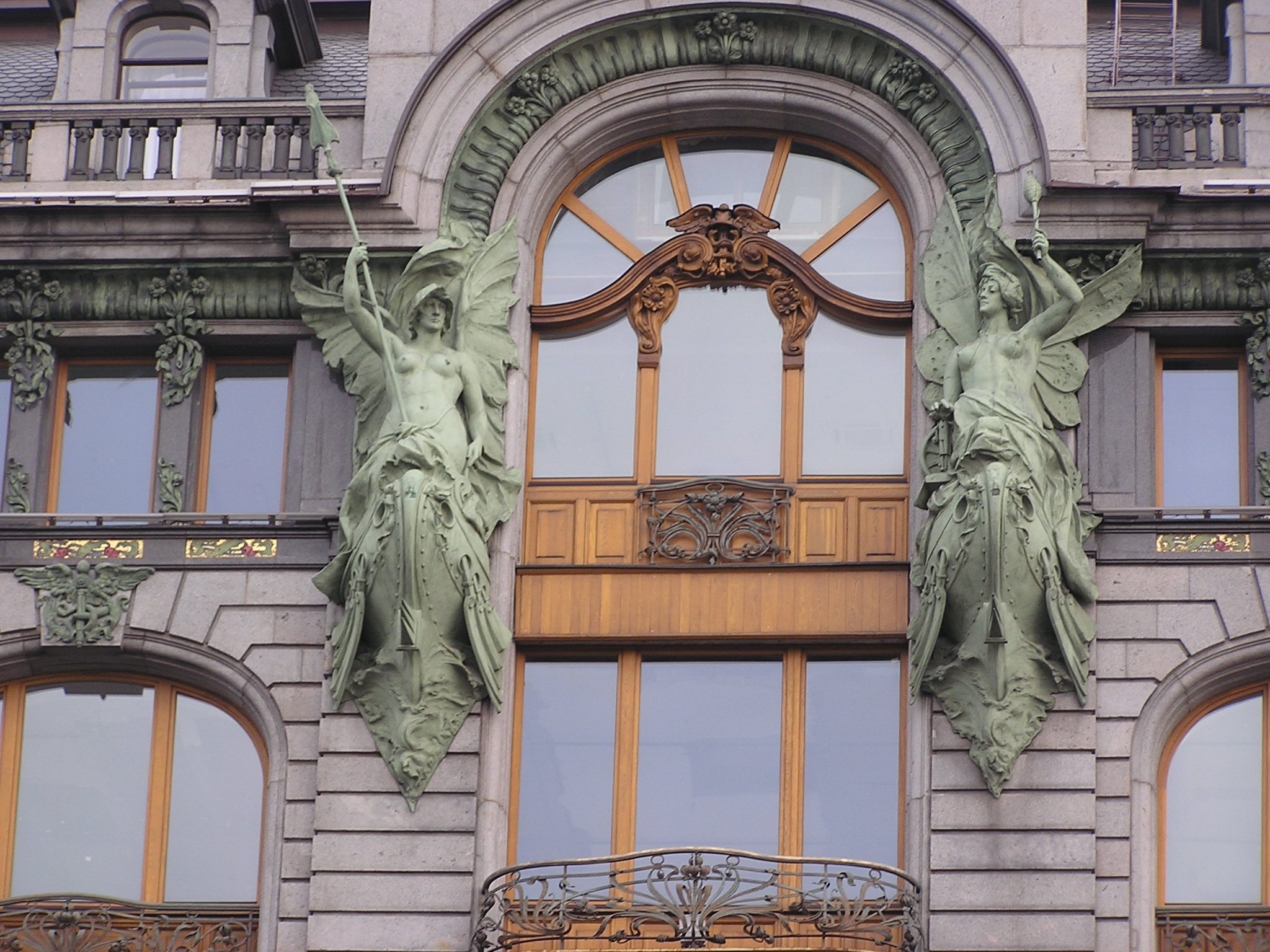 Санкт-Петербург. Невский проспект. Дом компании Зингер («Дом Книги»)